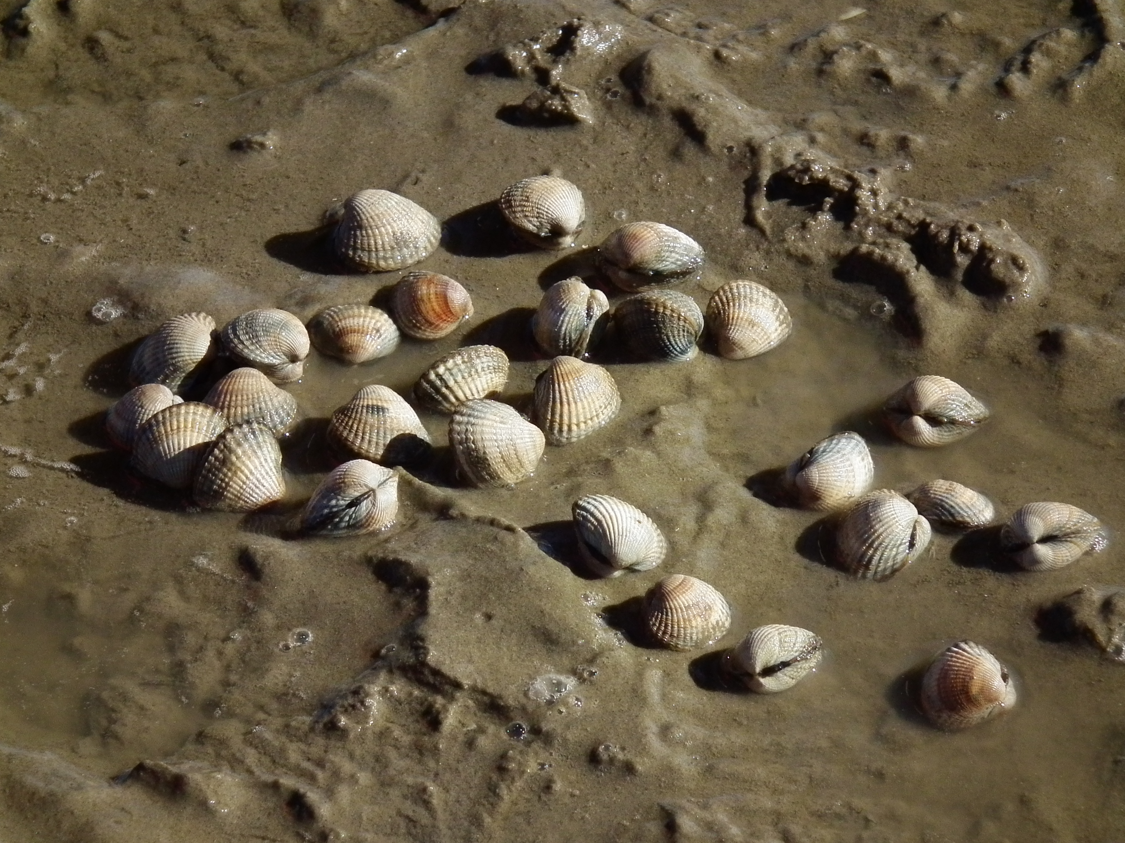 Gewöhnliche oder eßbare Herzmuscheln (Cerastoderma edule), fotografiert im Watt vor der ostfriesischen Nordseeinsel Juist (Niedersachsen, Deutschland)